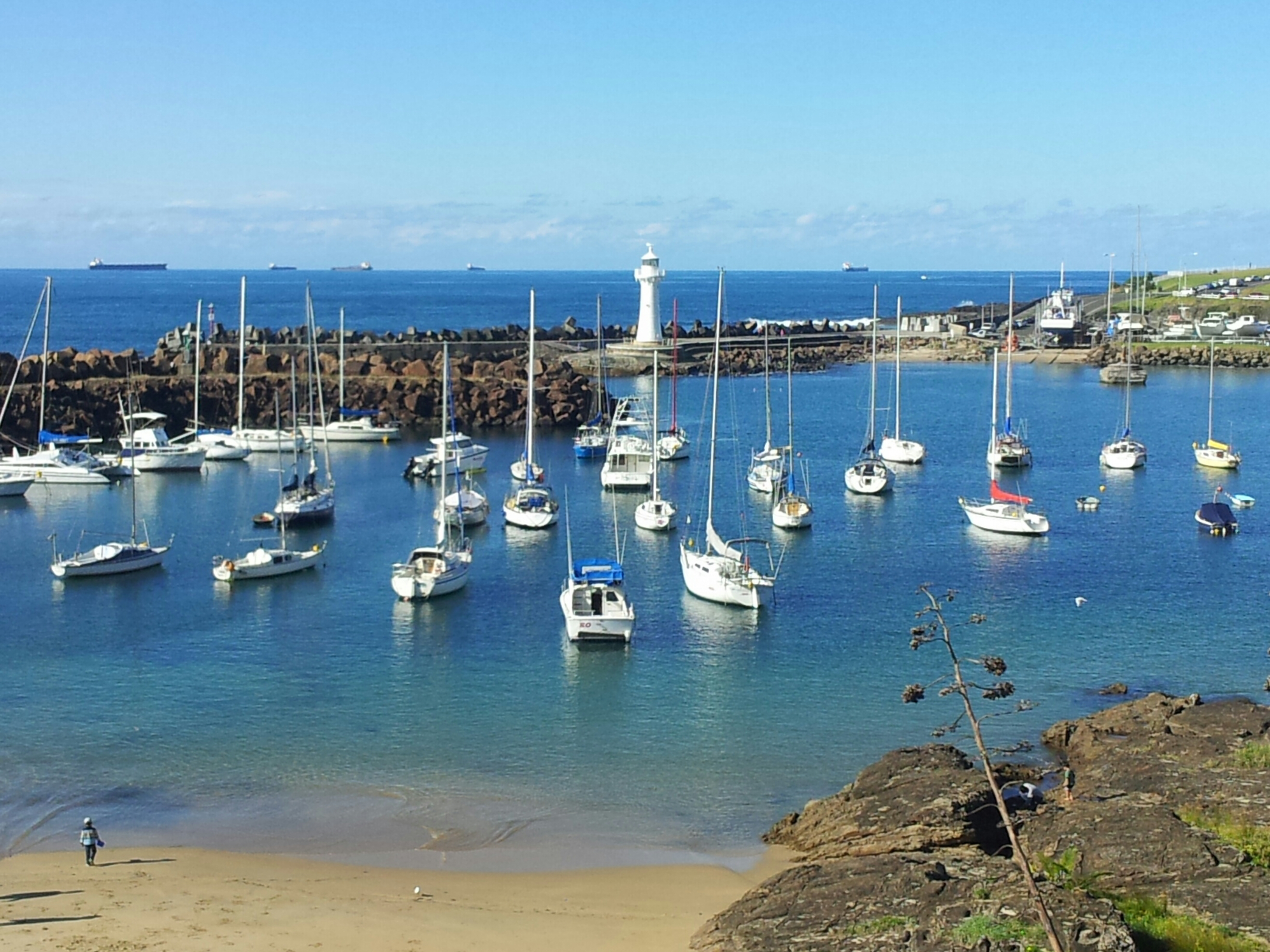 Wollongong NSW 2500, Australia